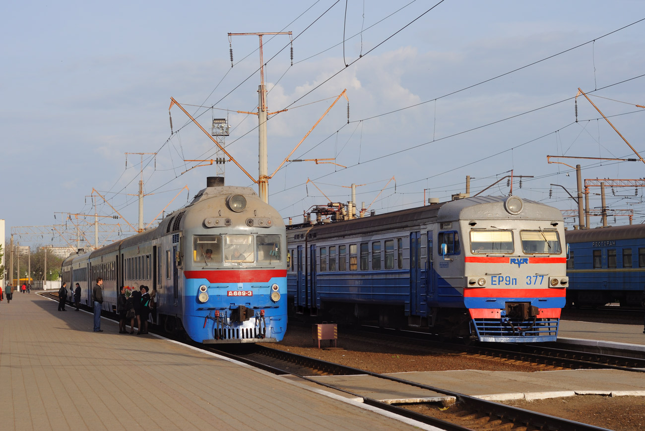 Дизель-поезд Д1-689 и электропоезд ЭР9П-377, станция имени Тараса Шевченко, Черкасская область